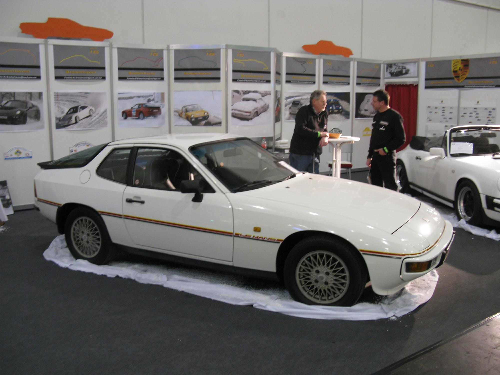 Porsche 924 Le Mans